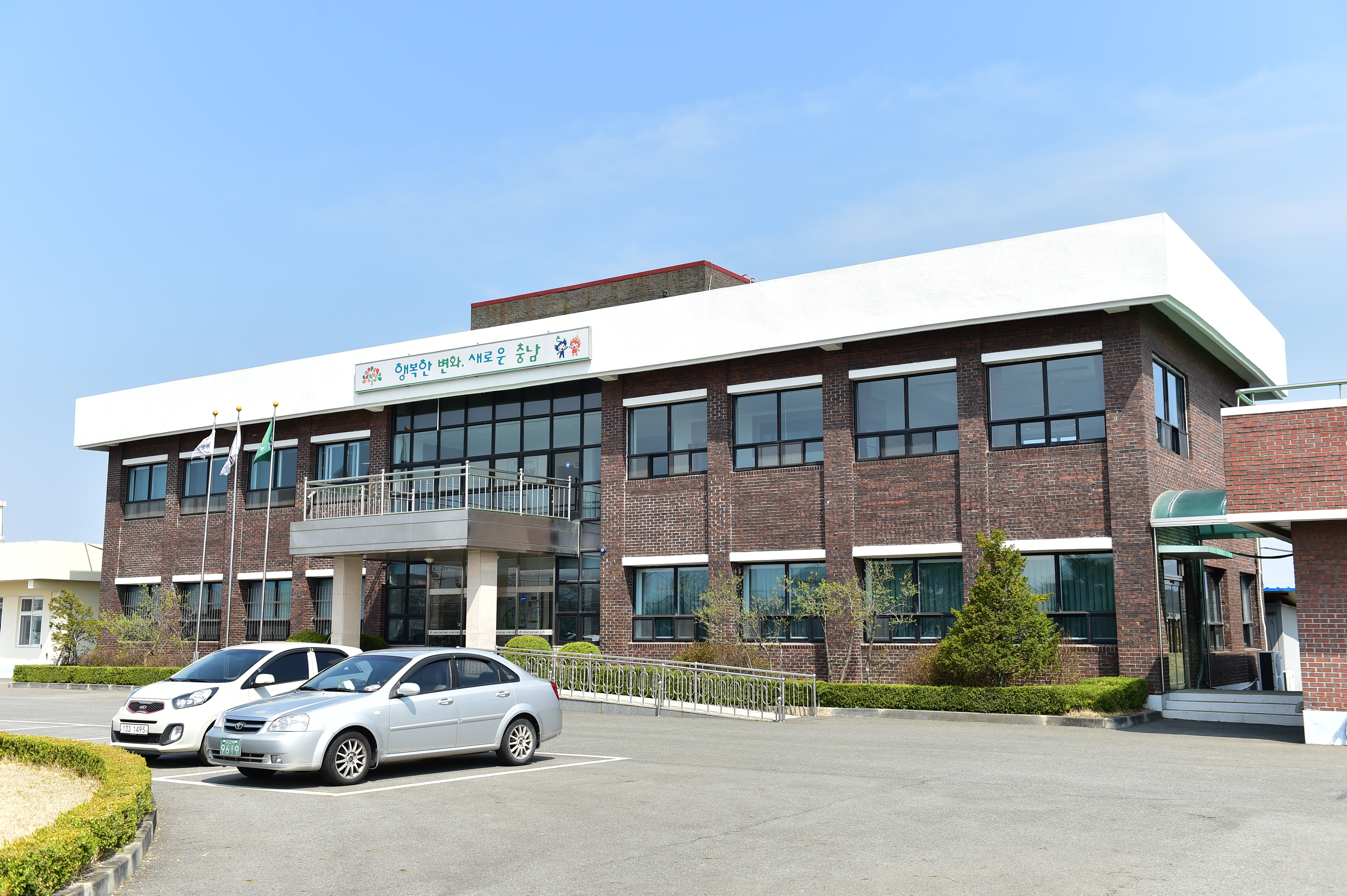 논산딸기시험장